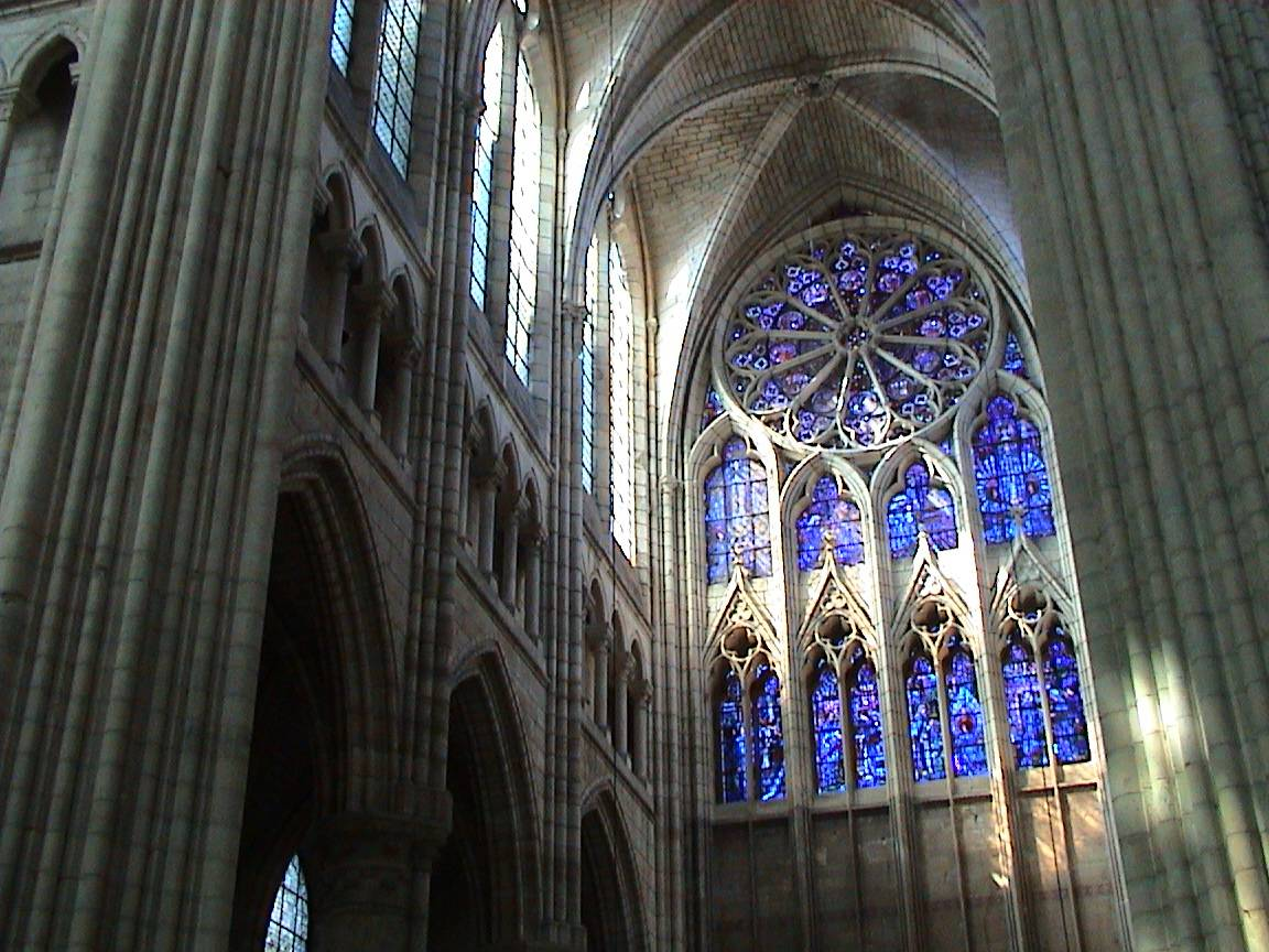 Kathedrale Saint-Gervais-et-Saint-Protais in Soissons